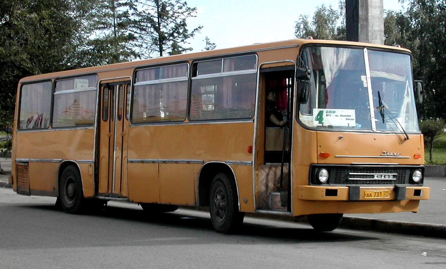 Ikarus 252.69 in Barnaul, Russia.